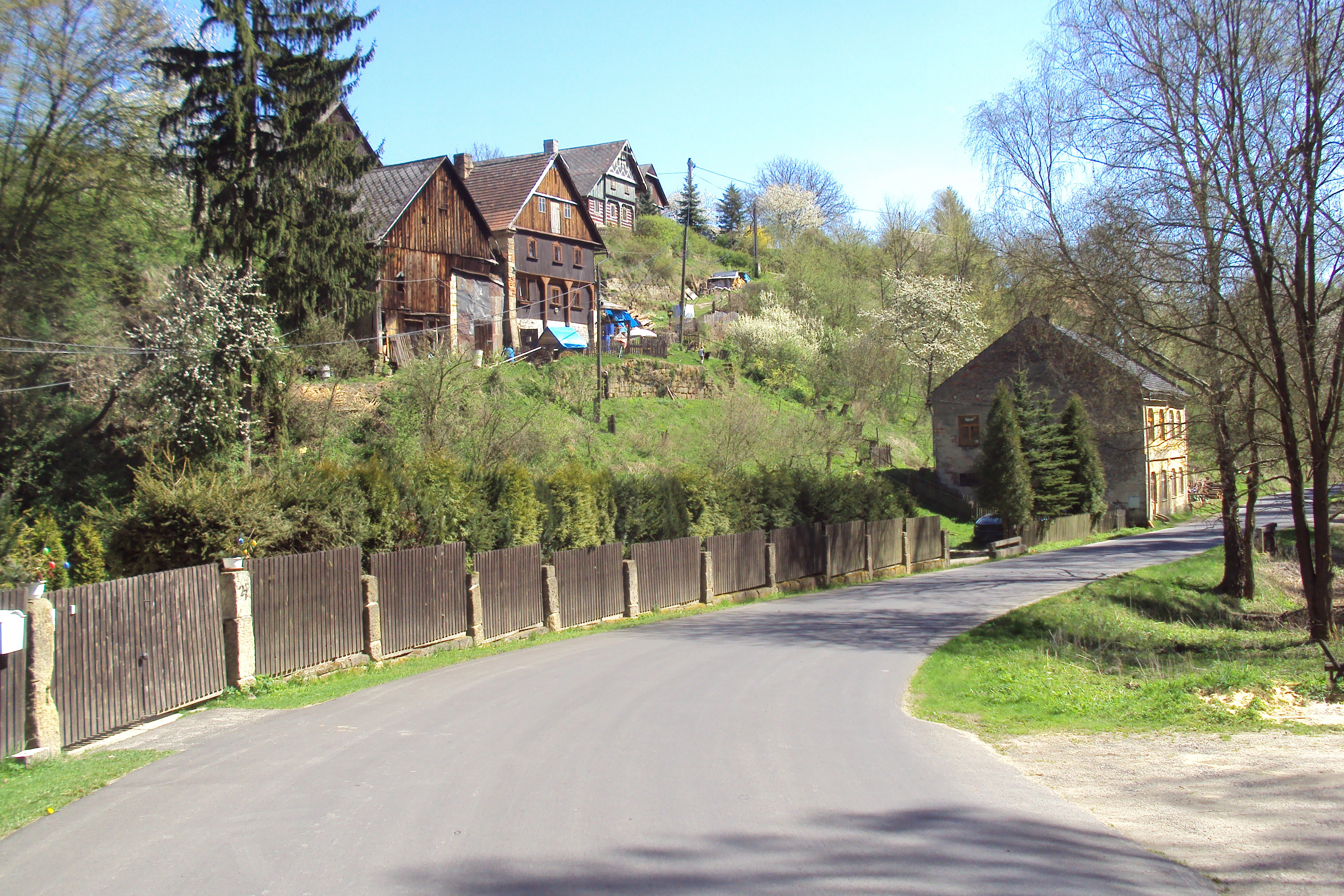 Stavení obce zespodu, od silnice z Dřevčic na Holany